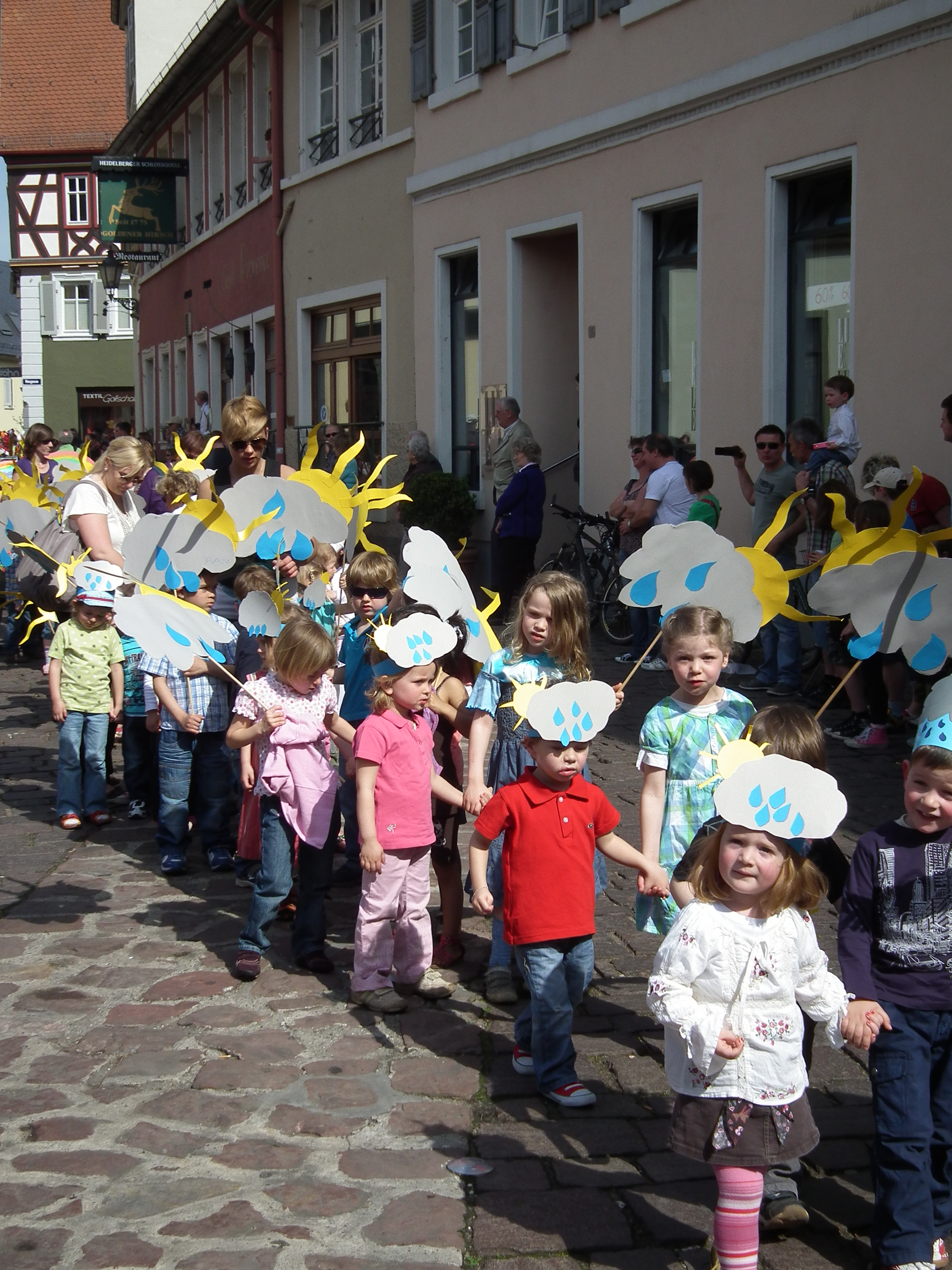 Sonnen- und Wolken der Kindertagesstätte Römernest beim Sommertagszug in Ladenburg (Baden-Württemberg, Deutschland)